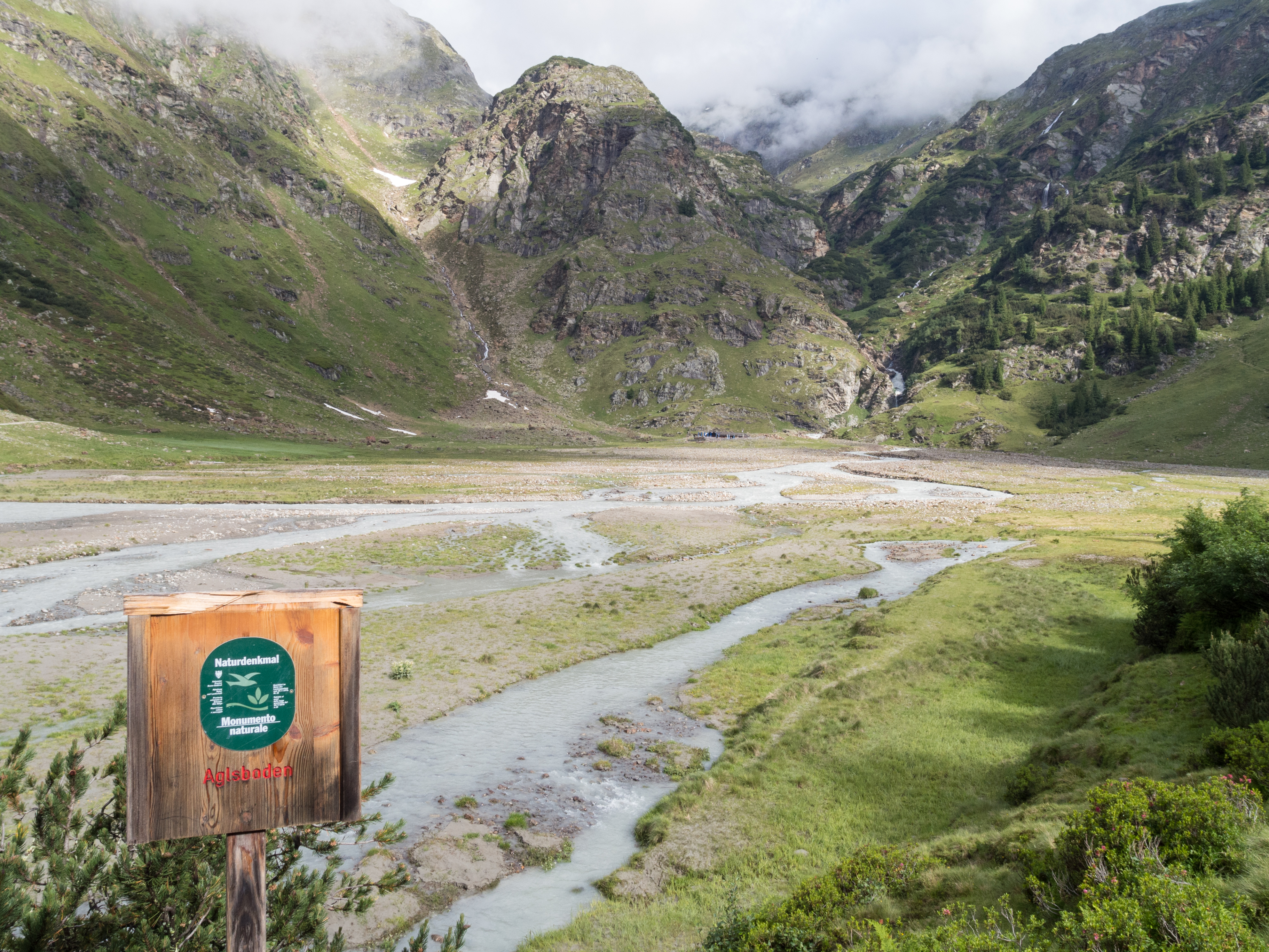 Naturdenkmal Aglsboden (Agglsboden), der vom Ridnauner Bach durchflossen wird